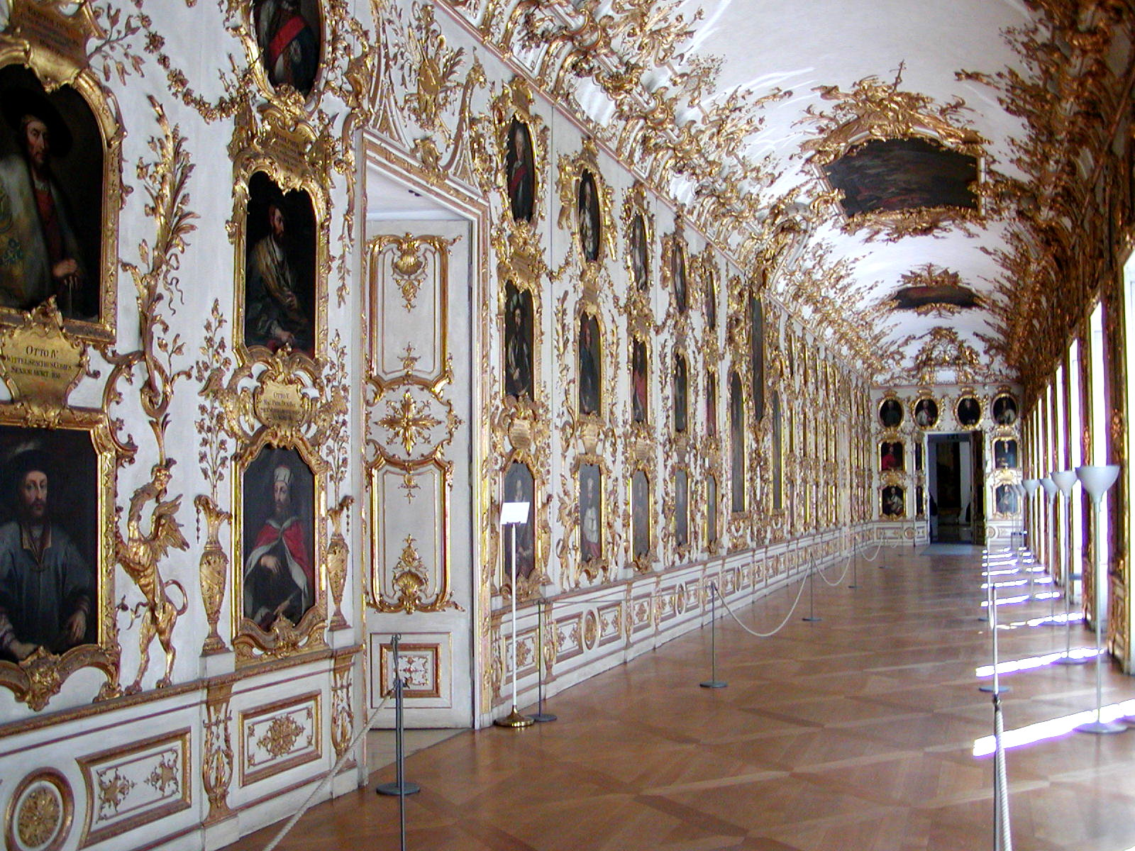 Münchner Residenz, Ahnengalerie